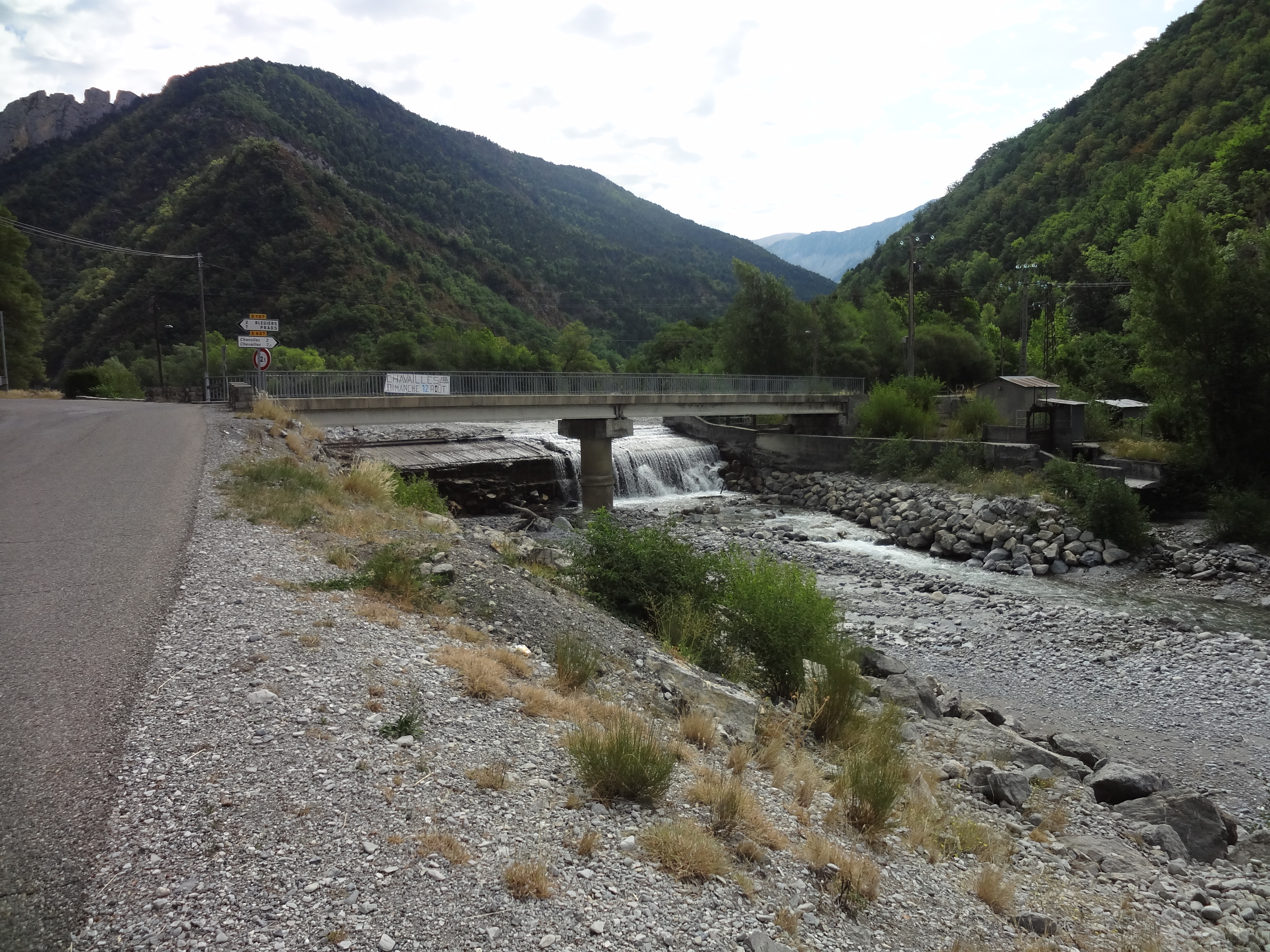 Ancien barrage de Chanolles